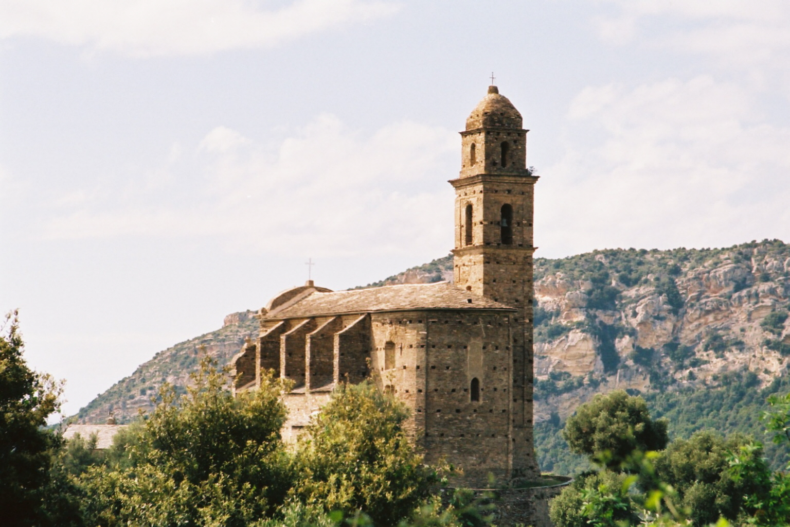 Patrimonio (Corsica) - San Martinu church